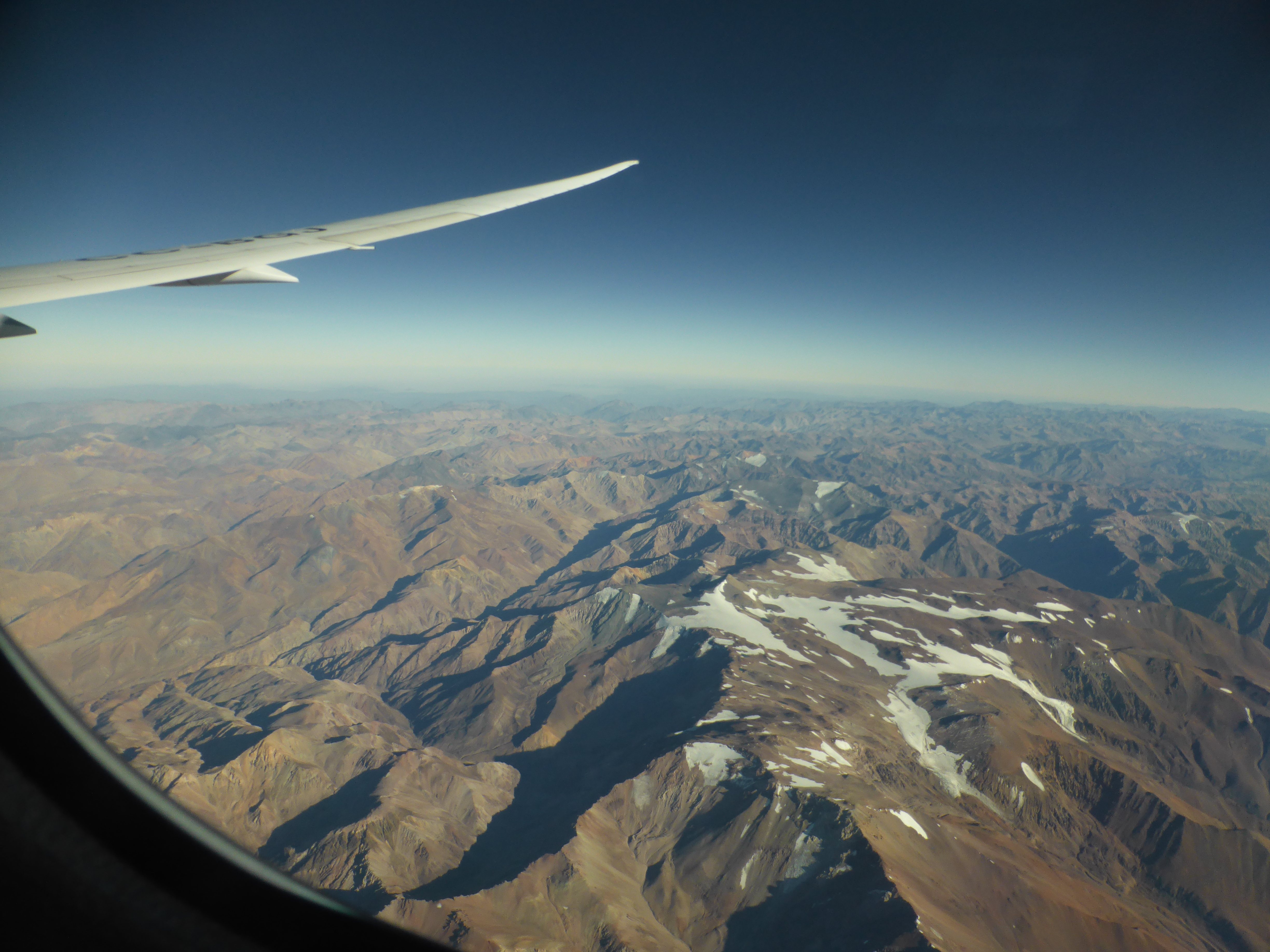 Andes australes, meridionales o del Sur. Cordillera de los Andes desde un avión con destino Santiago de Chile. Subregión de los Andes áridos.